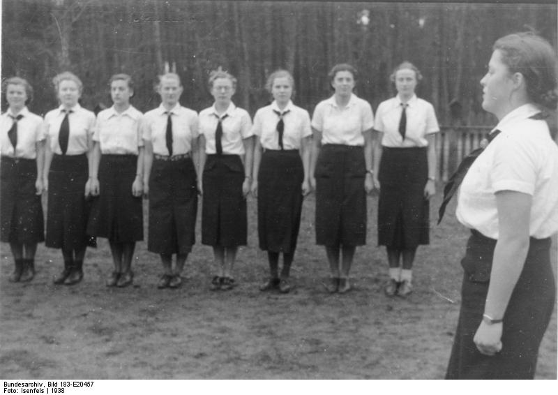 Auf Vorposten an der Memel Memelländischer BdM. im Schulungslager Auf. Isenfels Scherl Bilderdienst